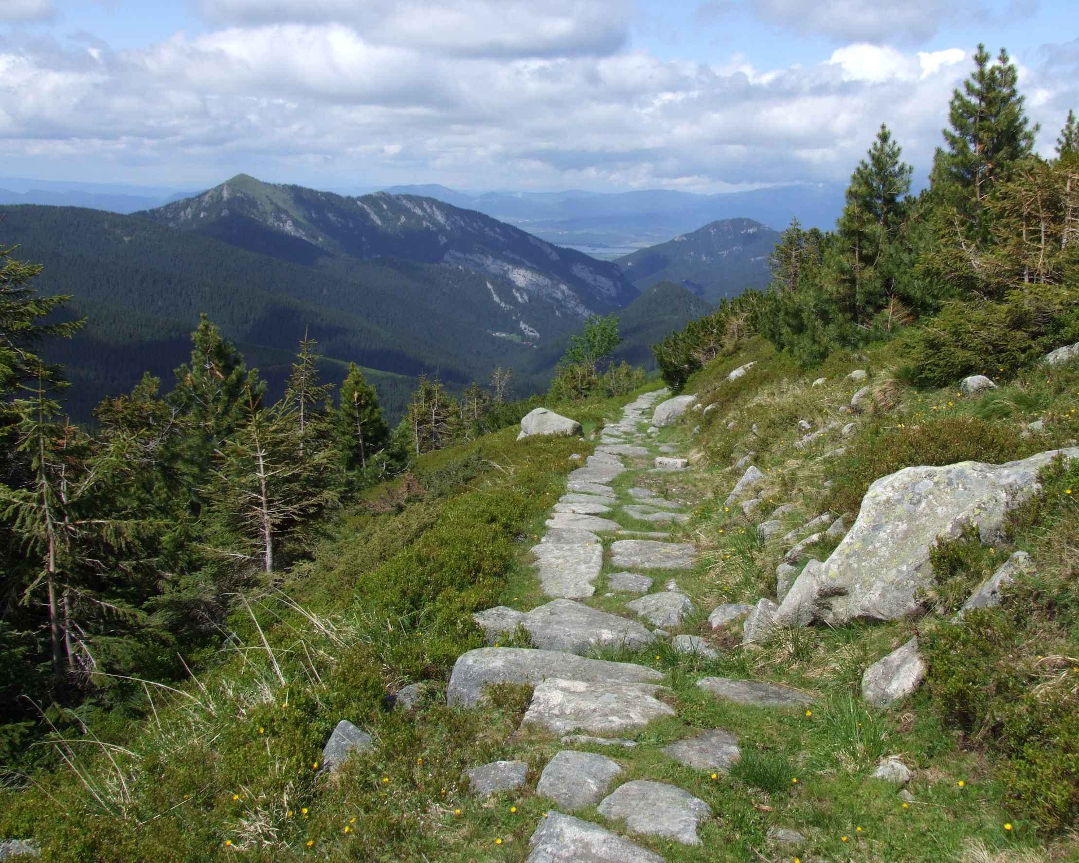 Niżne Tatry - niebieski szlak turystyczny z Chopoka